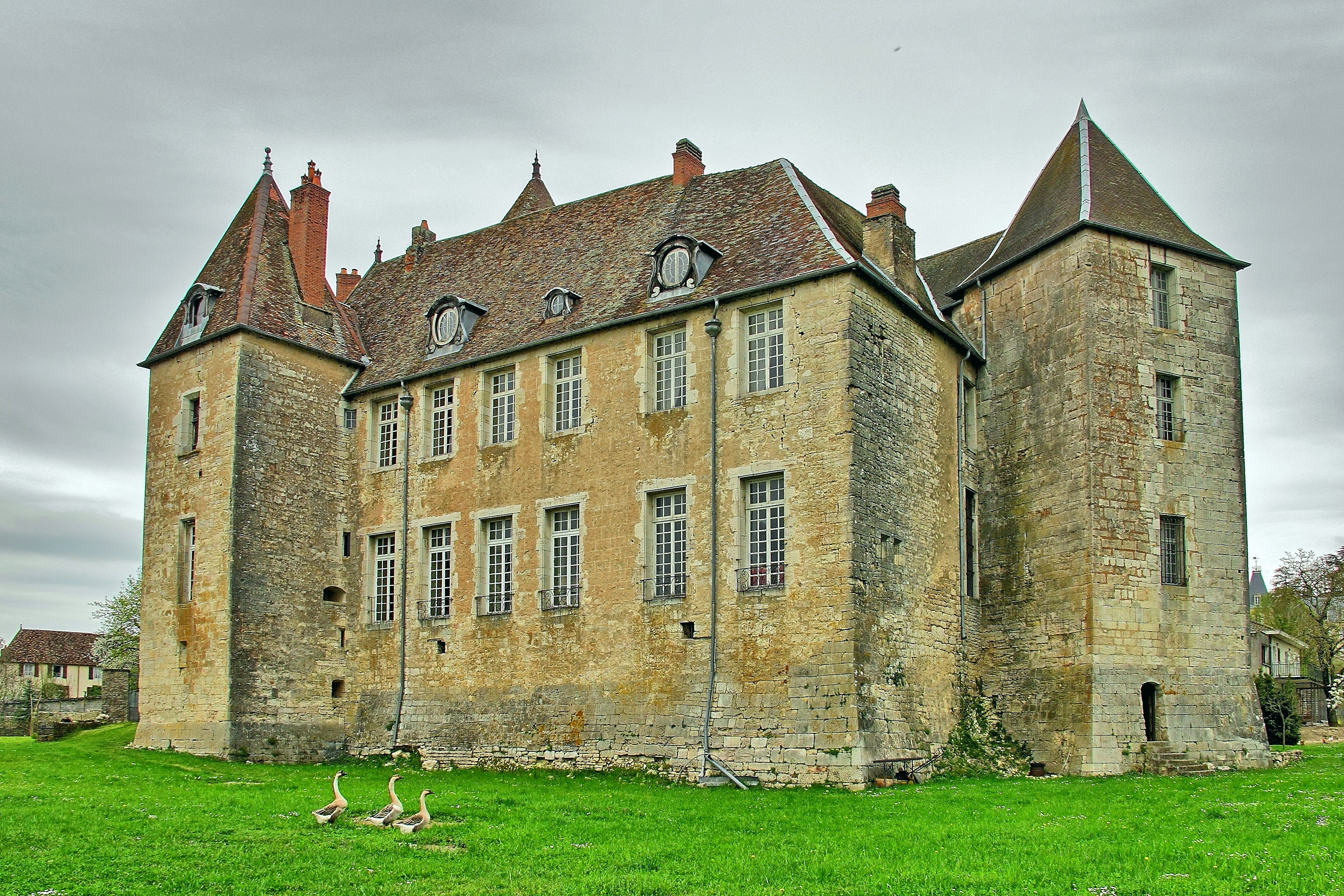 Inscrit aux monuments historiques sous le numéro PA00102189